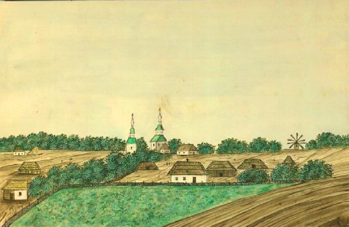 Боярка. Домінік П'єр де ля Фліз. «Медико-топографічний опис державних маєтностей Київської округи з зображенням деяких природних витворів рослинного і тваринного світу, разом із статистикою кожного села, їхнім виглядом, зробленим з натури, зображенням селянських костюмів та географічною картою Київської округи». Київ, 1854. - с. 652